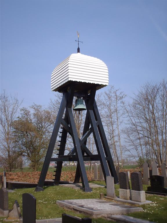 Klokkenstoel in Dijken, Friesland